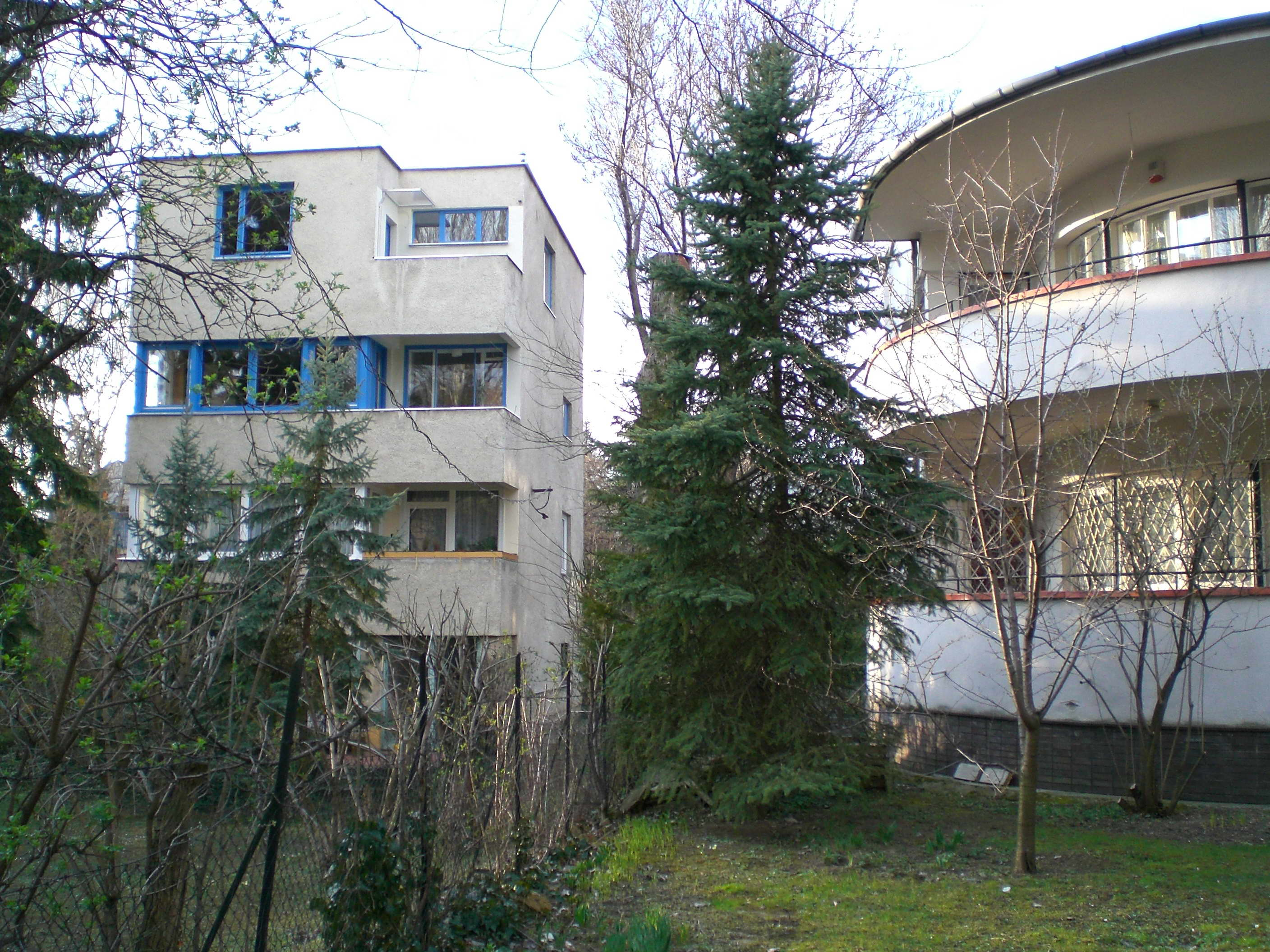 Bauhaus in Budapest about 1930